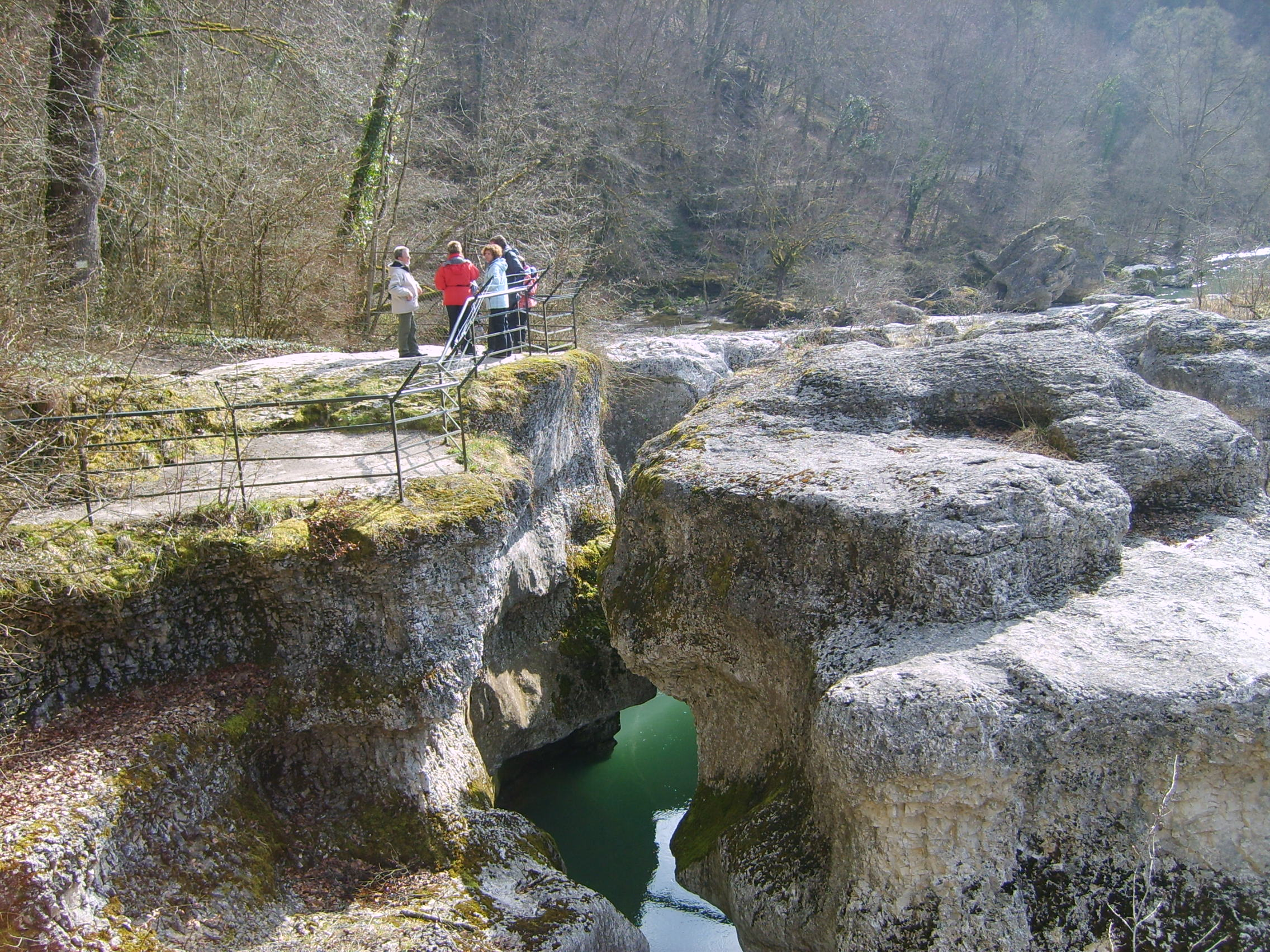 Les gorges du Fier, étroites et profondes que l'on peut visiter grâce à une passerelle suspendue aménagée. Cette gorge taillée par le torrent du Fier sur la commune de Lovagny (Haute-Savoie) près d'Annecy.